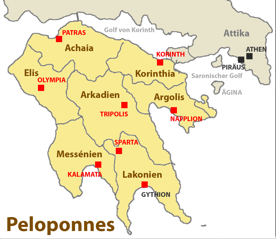 Peloponnes